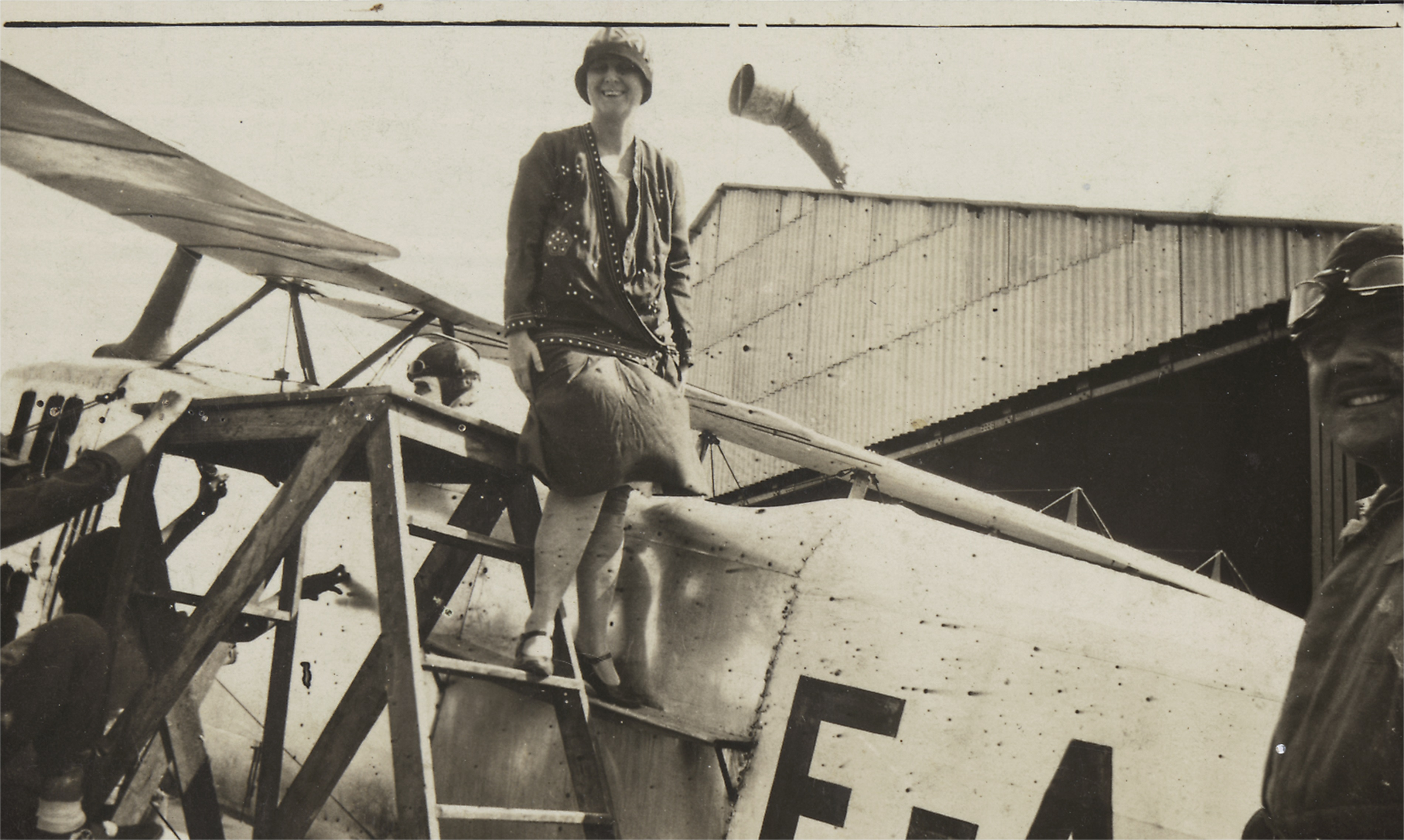 Bertha Lutz ao lado do avião do qual se lançaram panfletos de propaganda pelo voto feminino. Fundo: Federação Brasileira pelo Progresso Feminino.